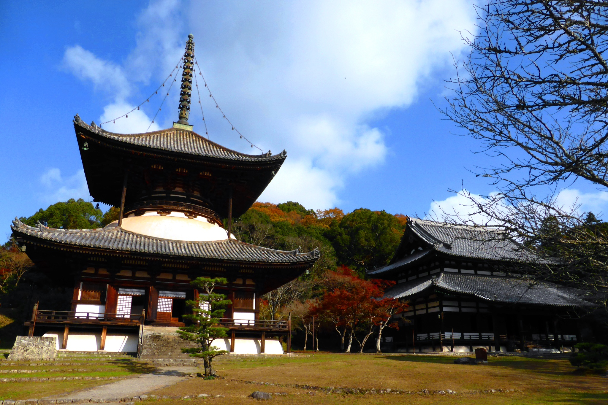 Negoro-ji, Daito (Pagoda) And Daidenpodo (Main Hall) -1 (December 2015)